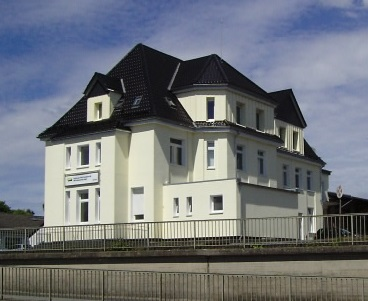 TWE-Bahnhof Gütersloh Nord, Verwaltungs- und Empfangsgebäude der Teutoburger Wald-Eisenbahn oberhalb der Friedrich-Ebert-Str.